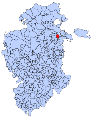 Mirabeche en Burgos